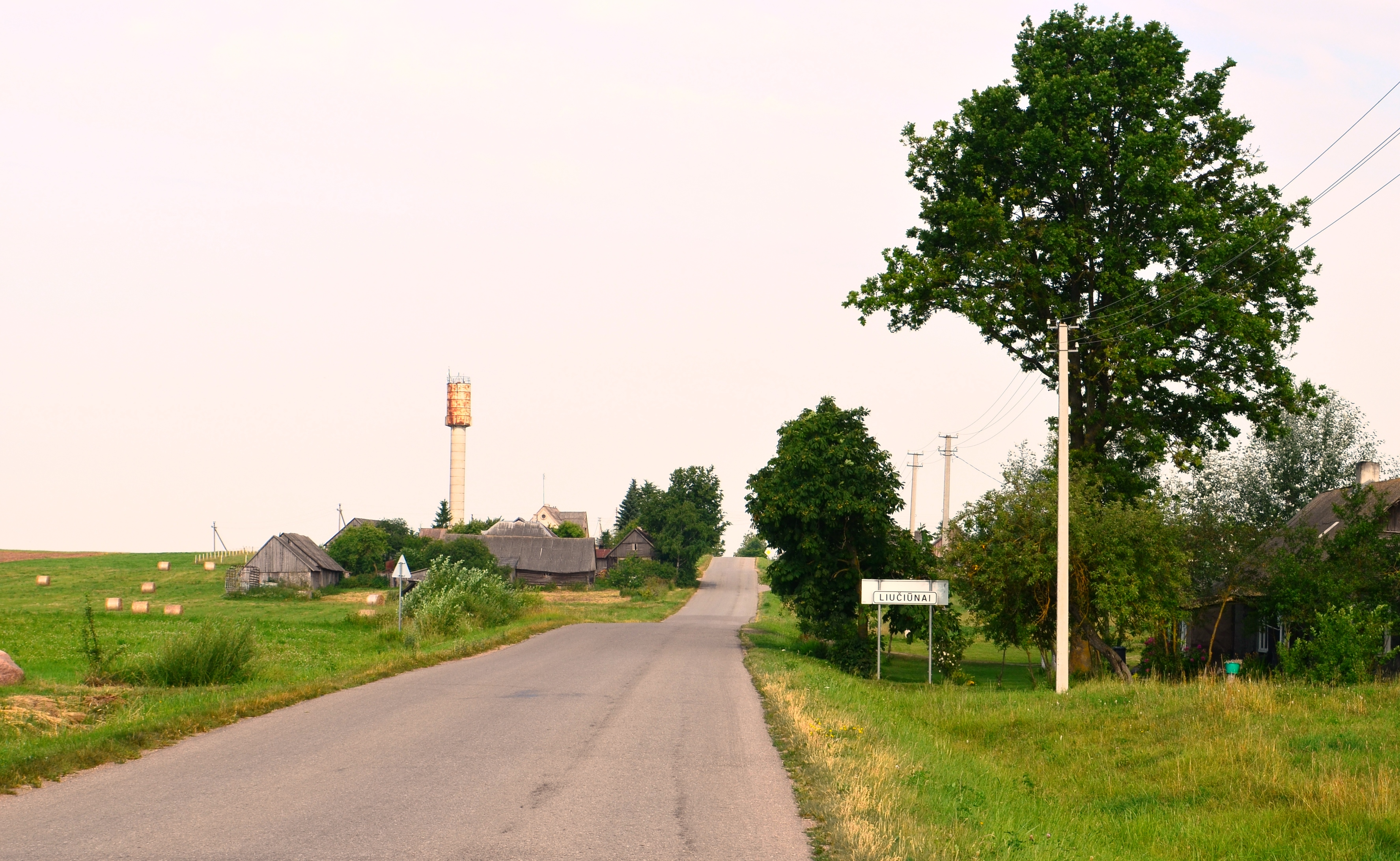 Liučiūnai, Kauno raj.